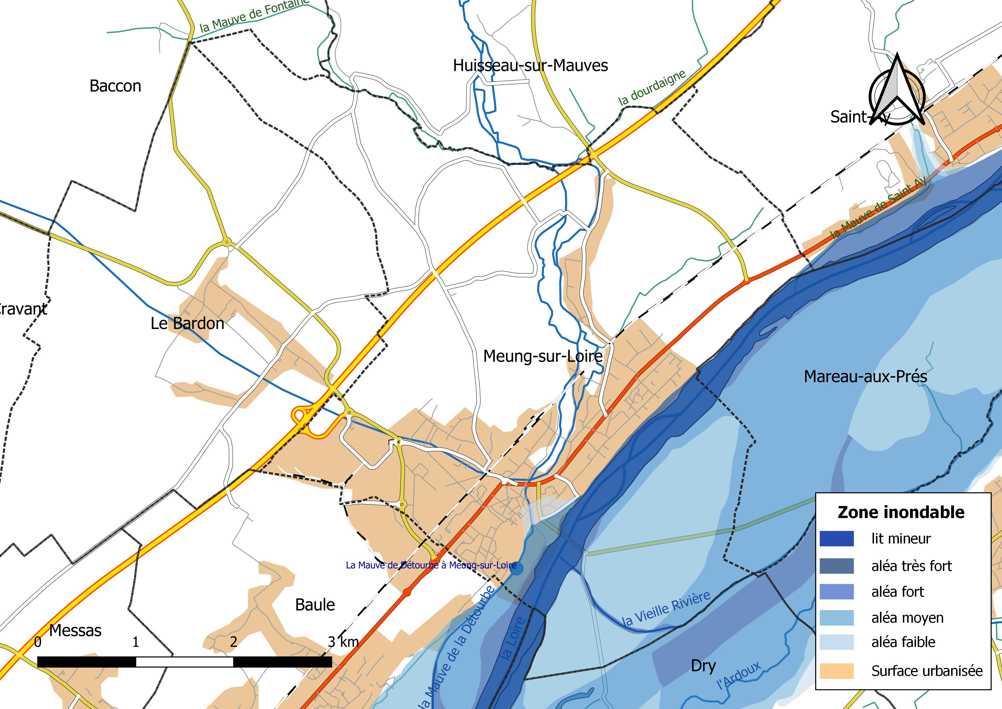 Zone inondable et réseaux hydrographique et routier de la commune de Meung-sur-Loire (Loiret, France).